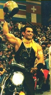 luchador profesional Titanes en el Ring